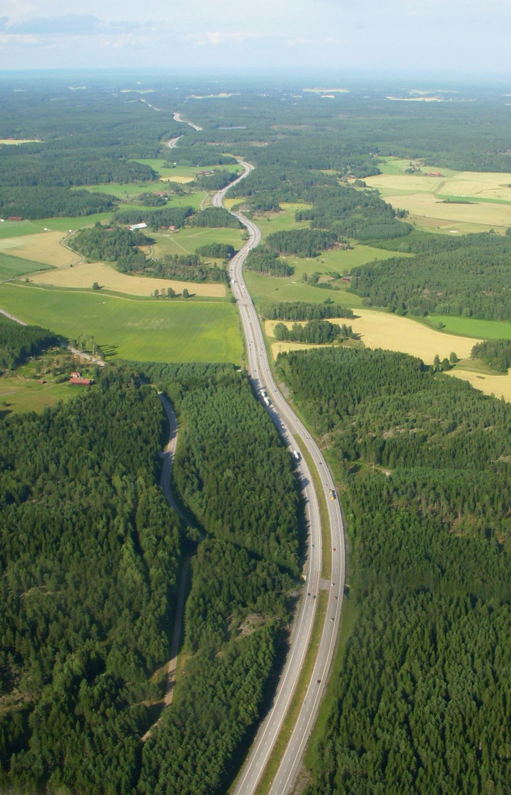 Motorväg E4 norr om Nyköping, vy not norr 2009 Own work by --Holger.Ellgaard (talk) 14:13, 23 August 2009 (UTC)